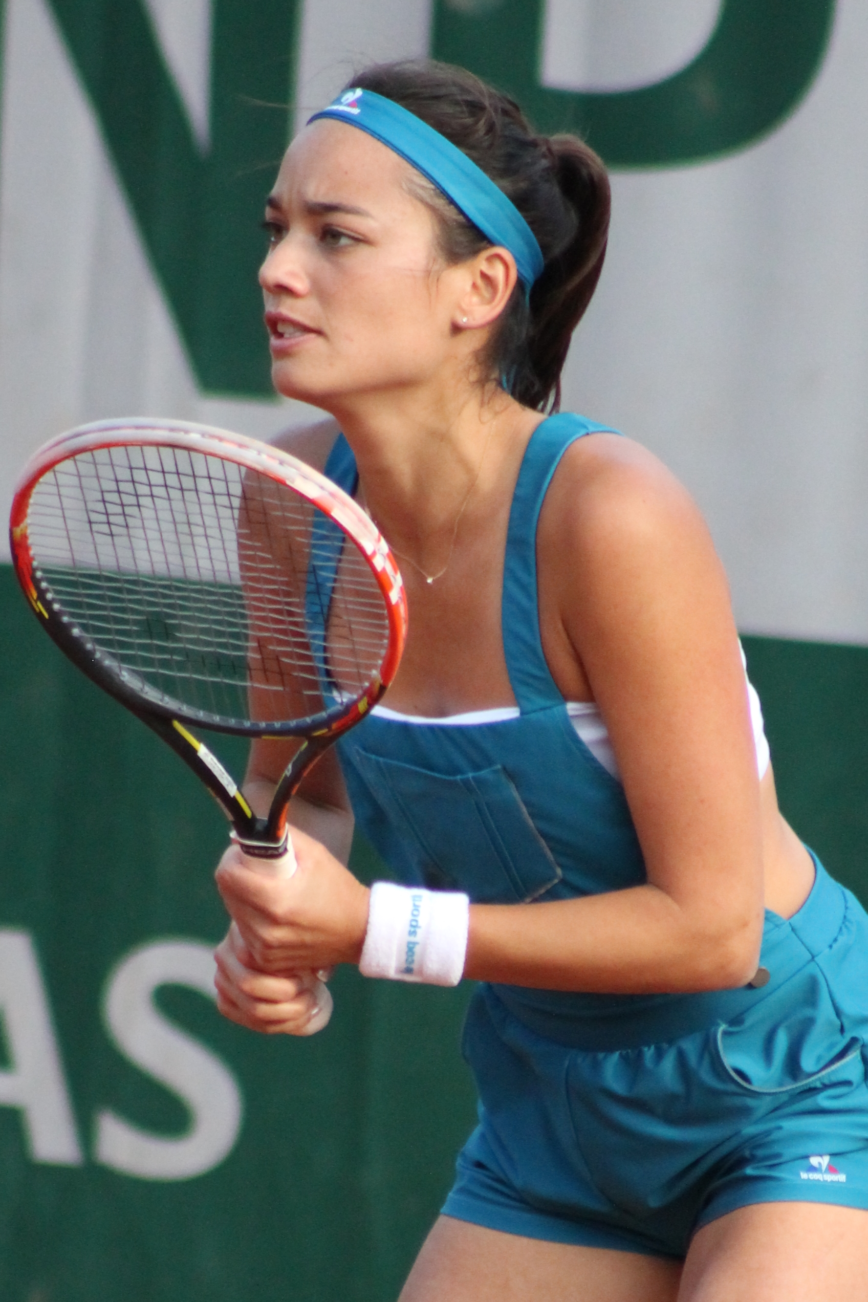 Alizé Lim RG16 (6)